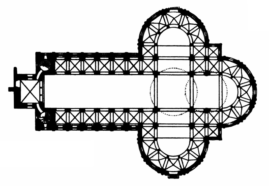 Basilika St. Maria im Kapitol Köln